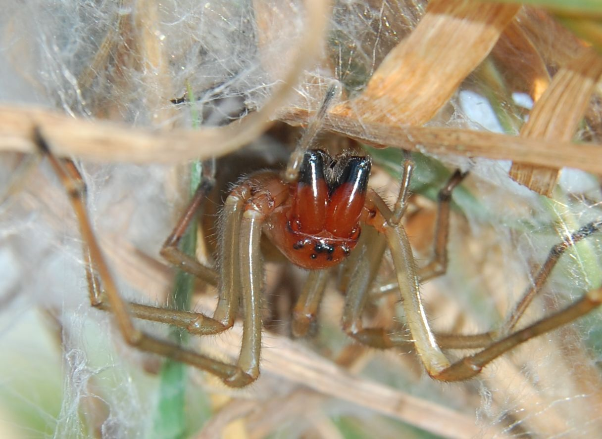 Cheiracanthium punctorium, female